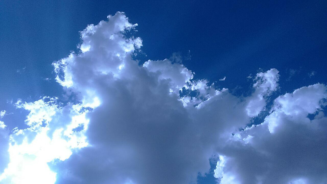 آسمان روستای سيد آباد